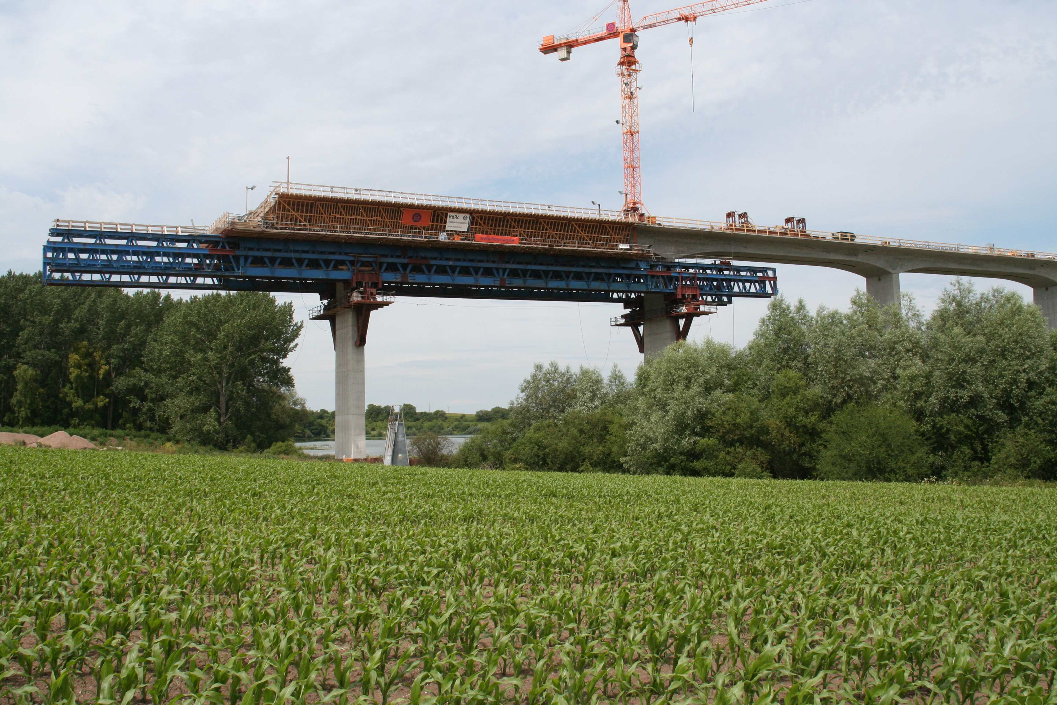 Scherkondetalbrücke bei Krautheim in Thüringen